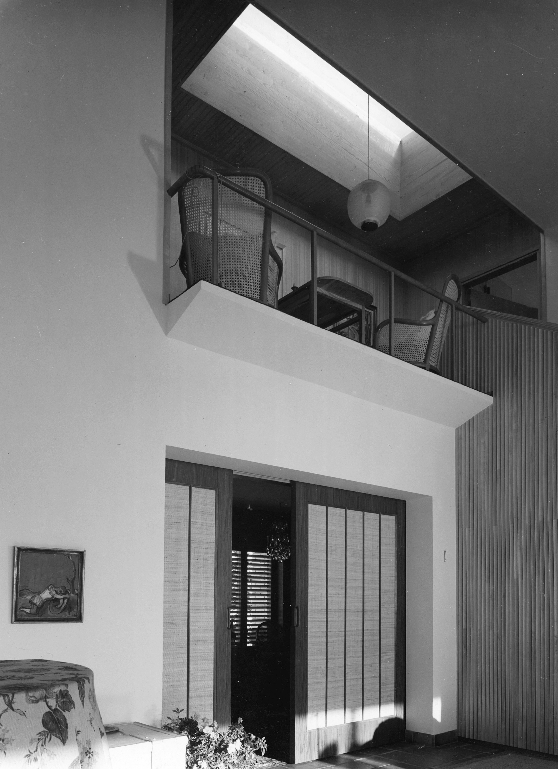 Villa Engkvist vardagsrum